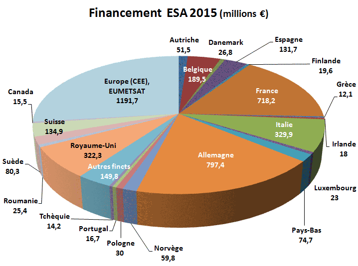 Budget 2015 de l'Agence spatiale européenne : contributeurs